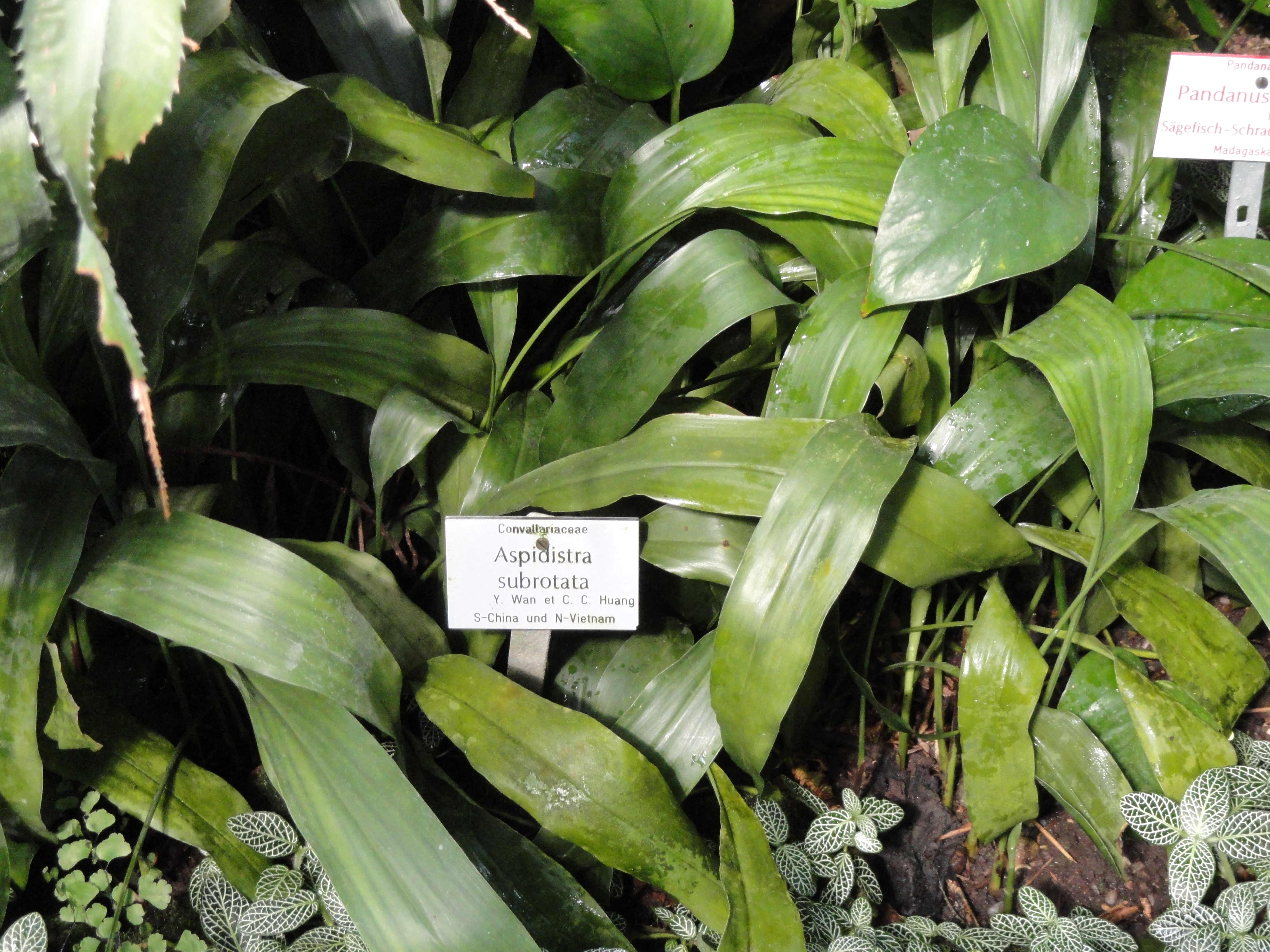 Aspidistra subrotata specimen in the Botanischer Garten München-Nymphenburg, Munich, Germany.